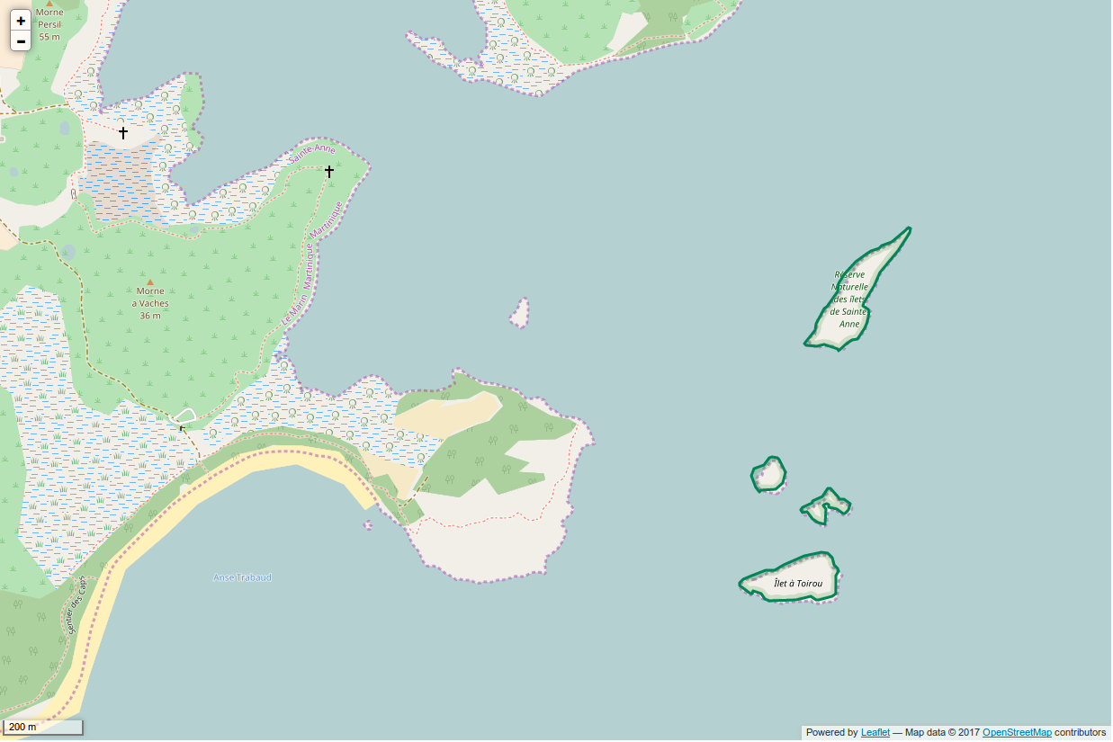 Périmètre de la RNN des Ilets de Sainte-Anne.